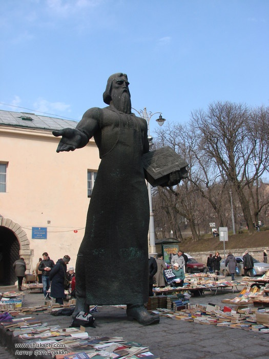 Помнік Івану Федаровічу ў Львове